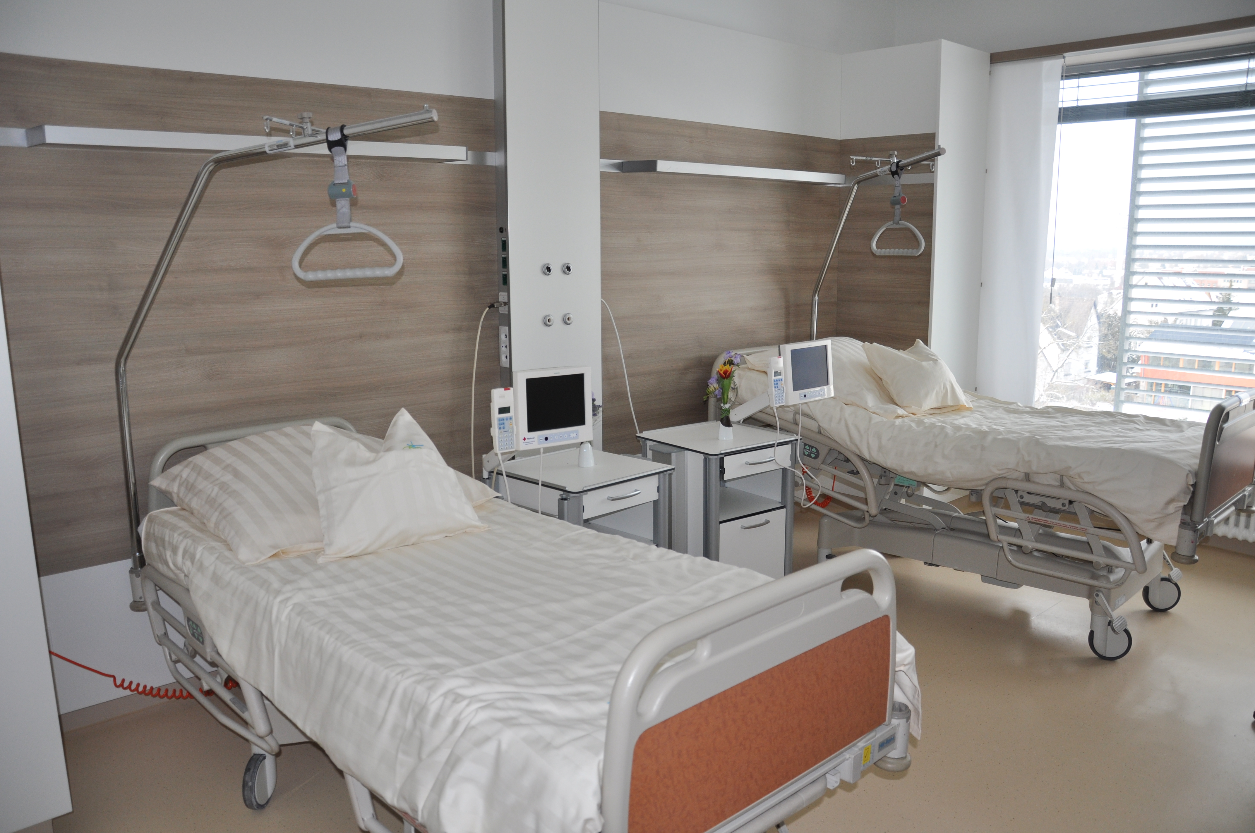 Ravensburg, Krankenhaus St. Elisabeth, Krankenzimmer im neuen Bettenhaus (am Tag der offenen Tür 2013)